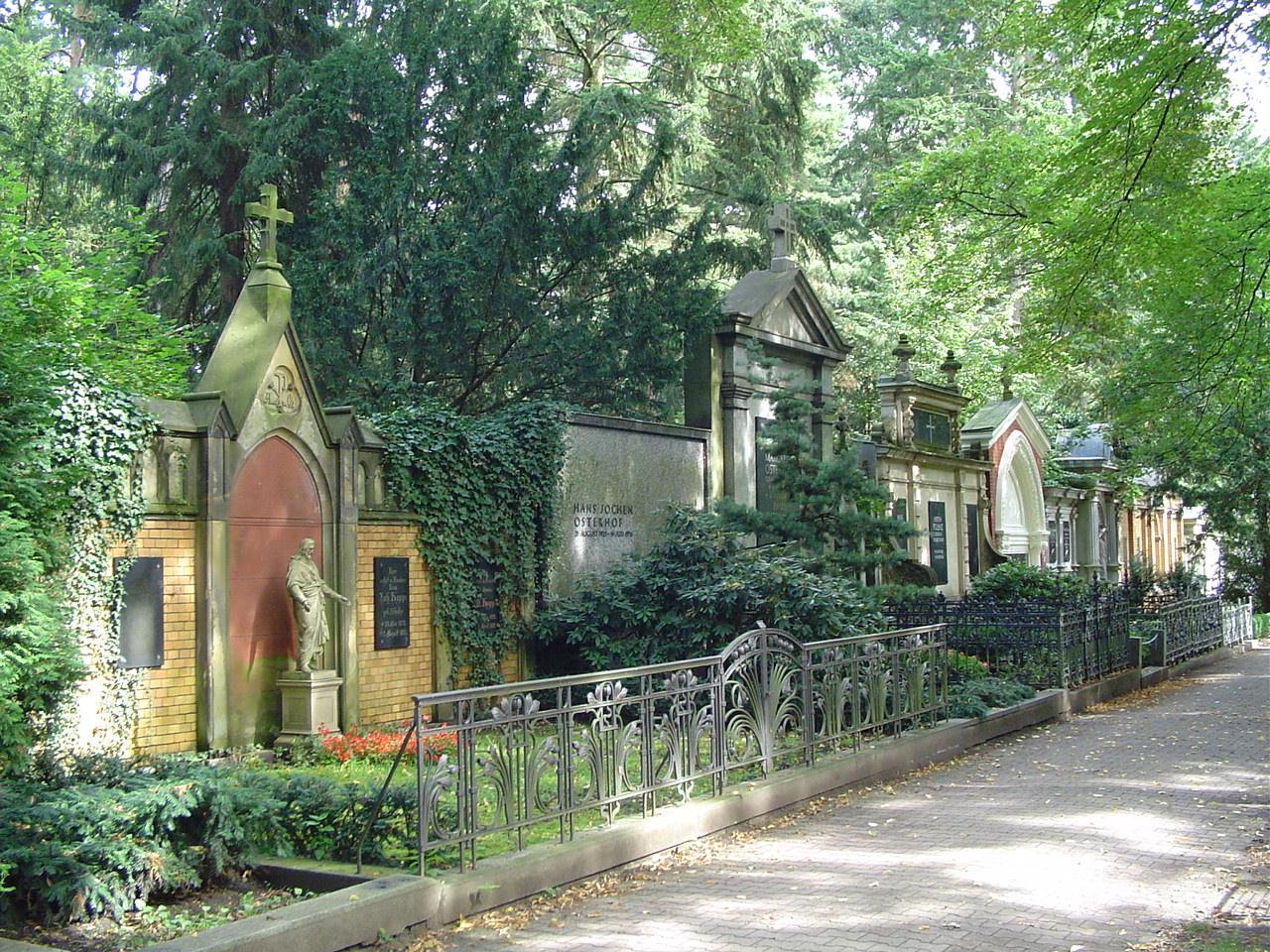 Friedhof In den Kisseln, Berlin-Spandau